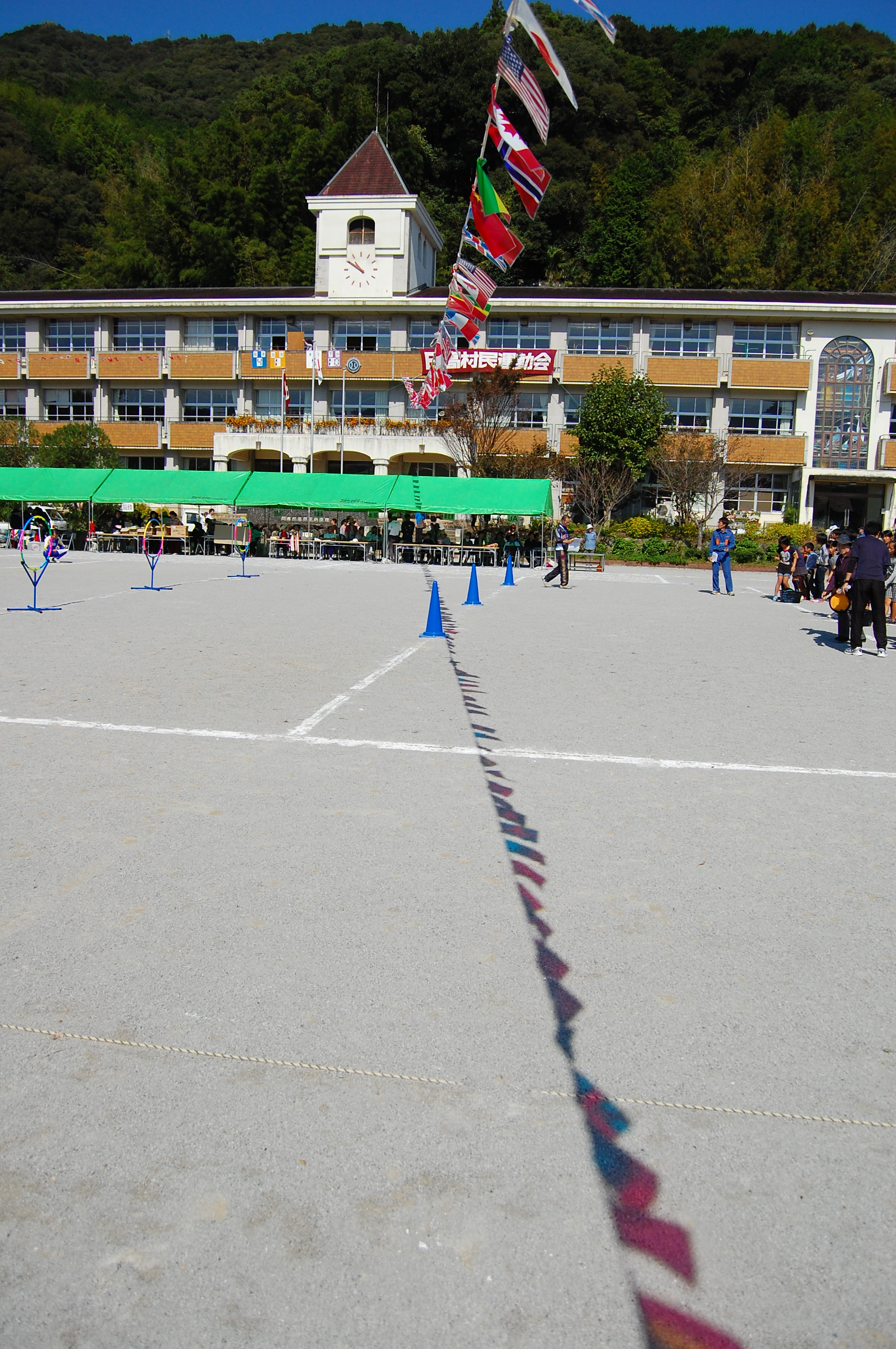 日高村民運動会 ＠ 村立日下小学校 [1] [2]